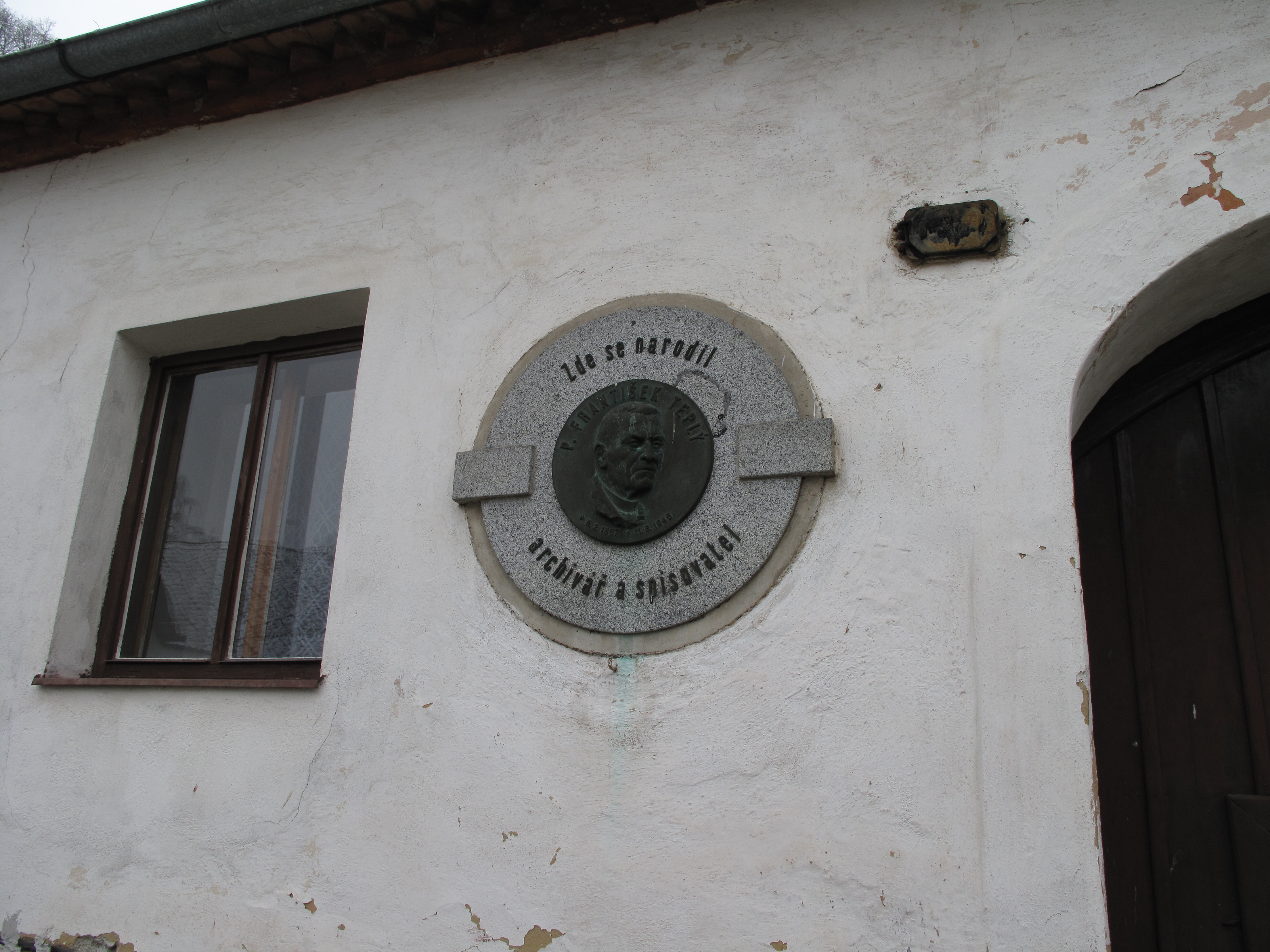 Deska v Marčovicích. Okres Strakonice, Česká republika.